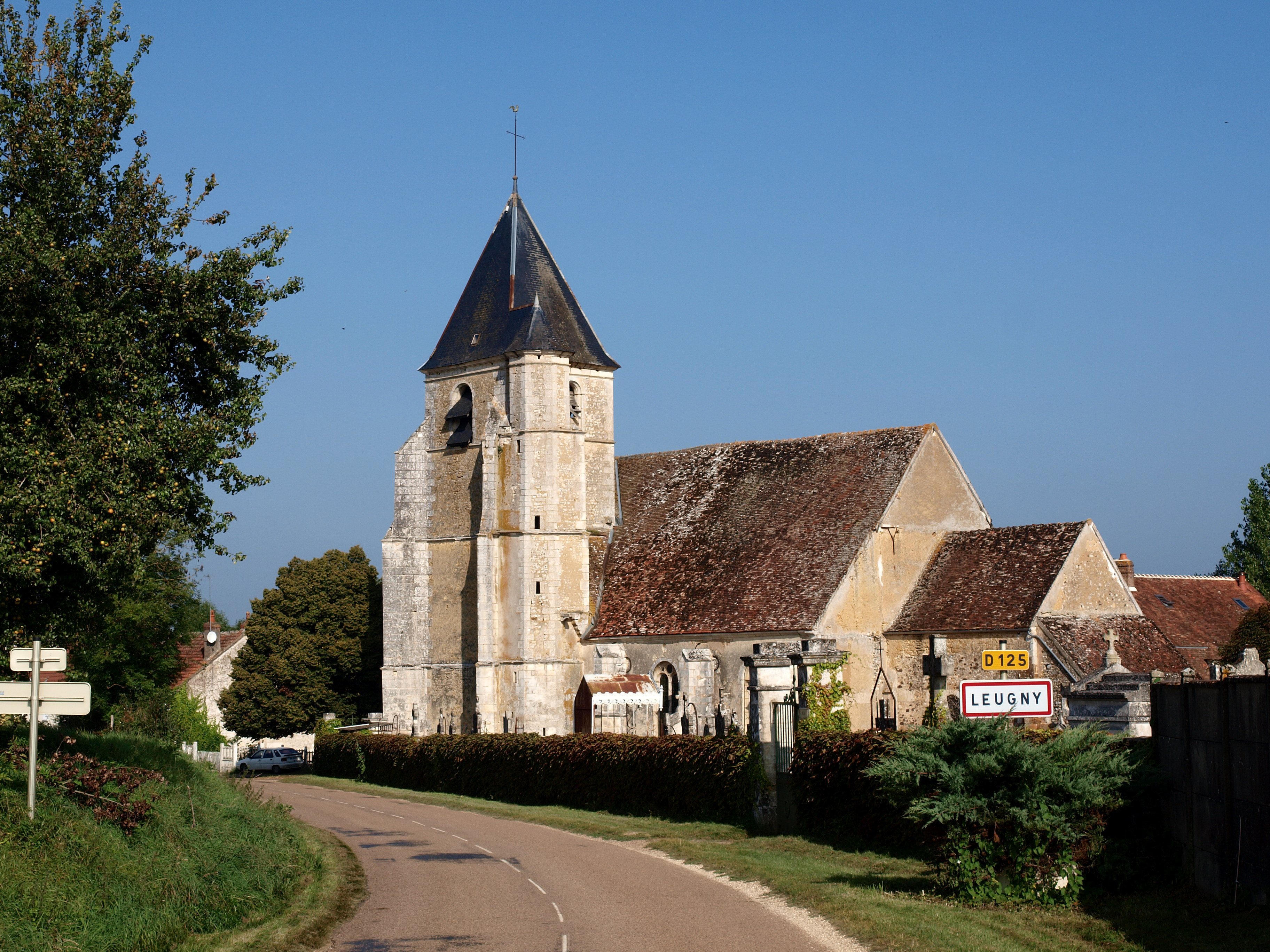 Leugny (Yonne, France) ; église